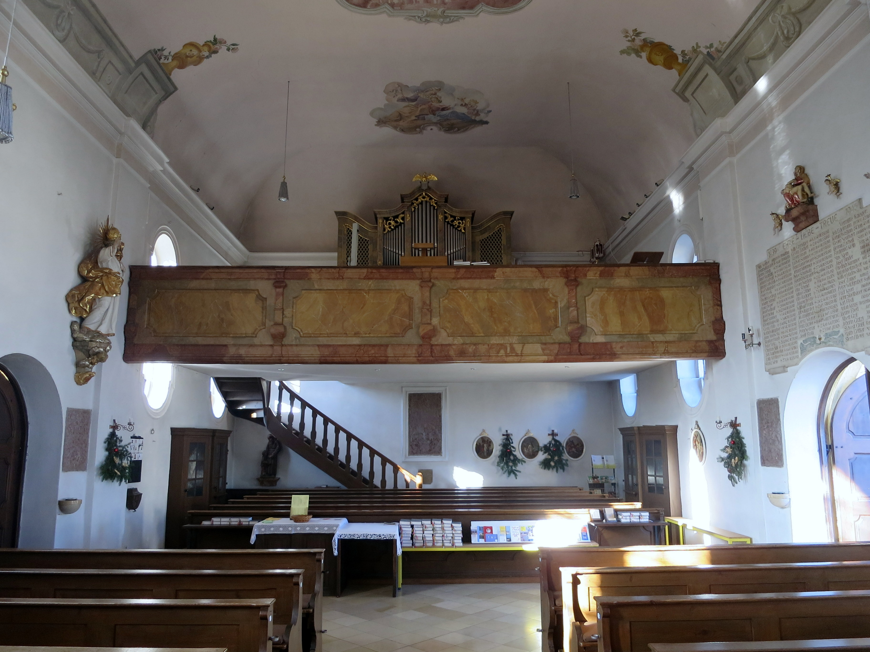 Orgelempore